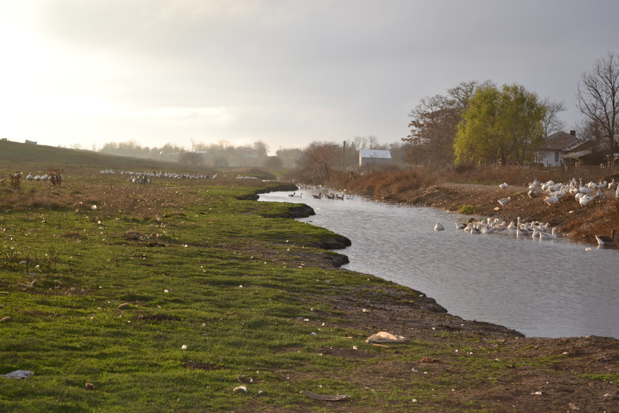 În lungul Văii Mari